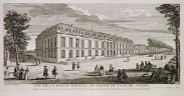 Le château de Choisy au 18e siècle - Vu depuis le jardin